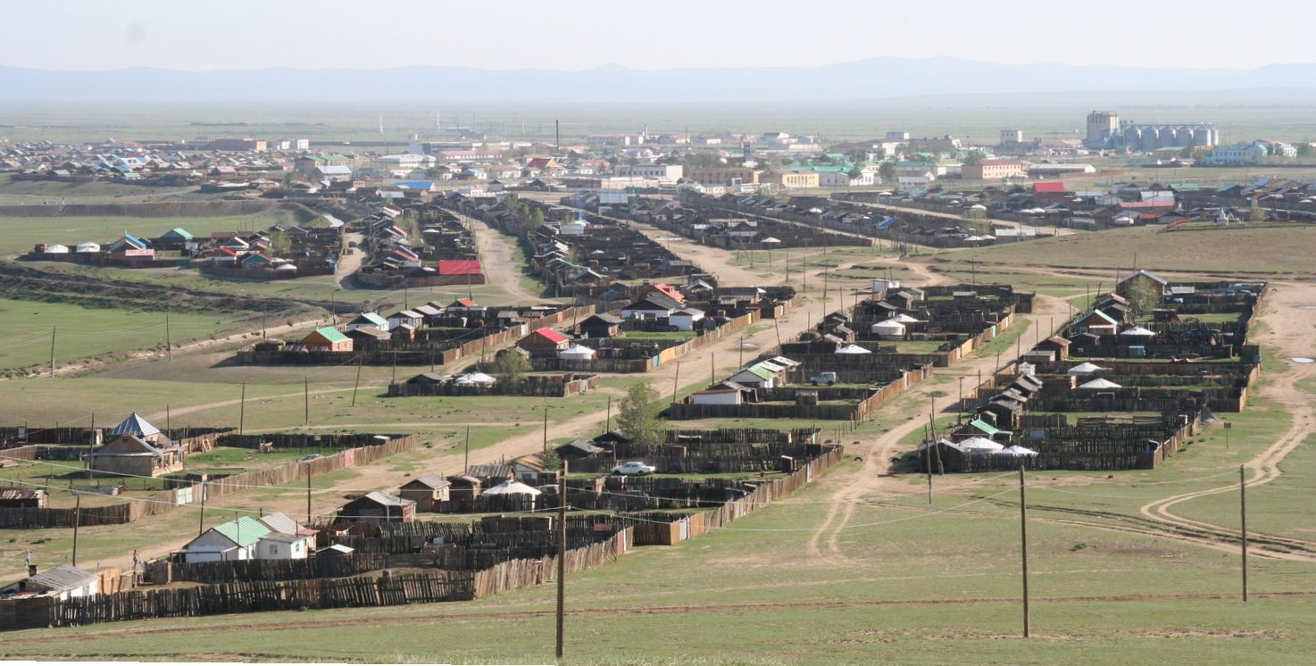 Ville de Karakorum Монгол: Хархорин